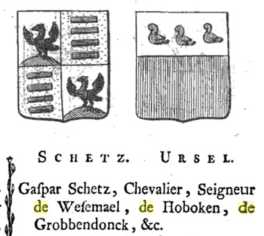 Schetz and Ursel in: Quartiers généalogiques des familles nobles des Pays-Bas.